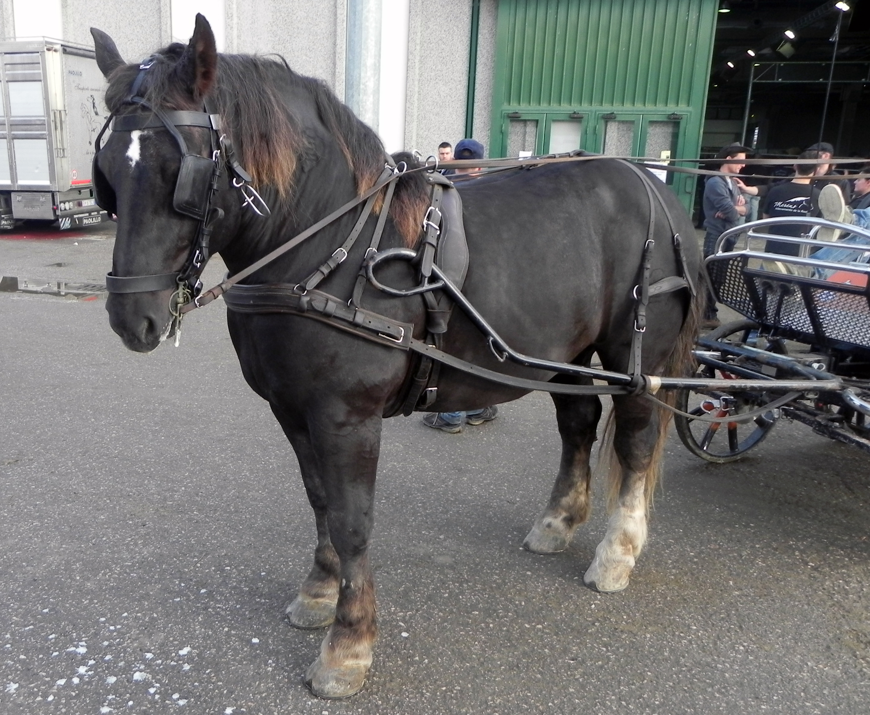 TPR (Cavallo Agricolo Italiano da Tiro Pesante Rapido) in harness, photographed at Fieracavalli, Verona, Italy, on 9 November 2014.